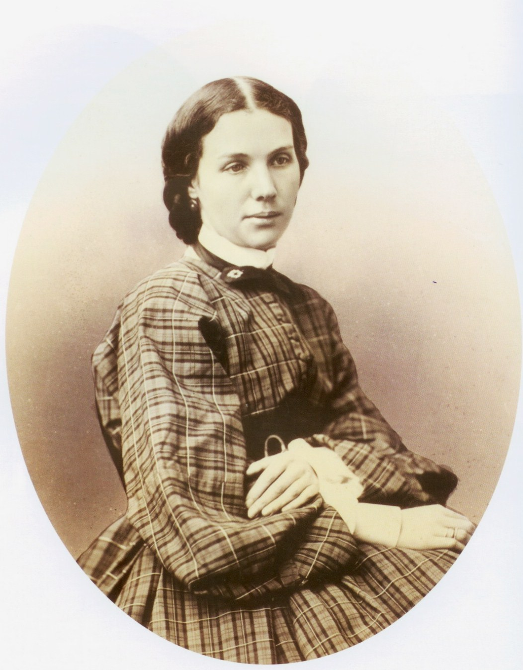 Елизавета Алексеевна Жемчужникова, ур. Дьякова (1833—1875).